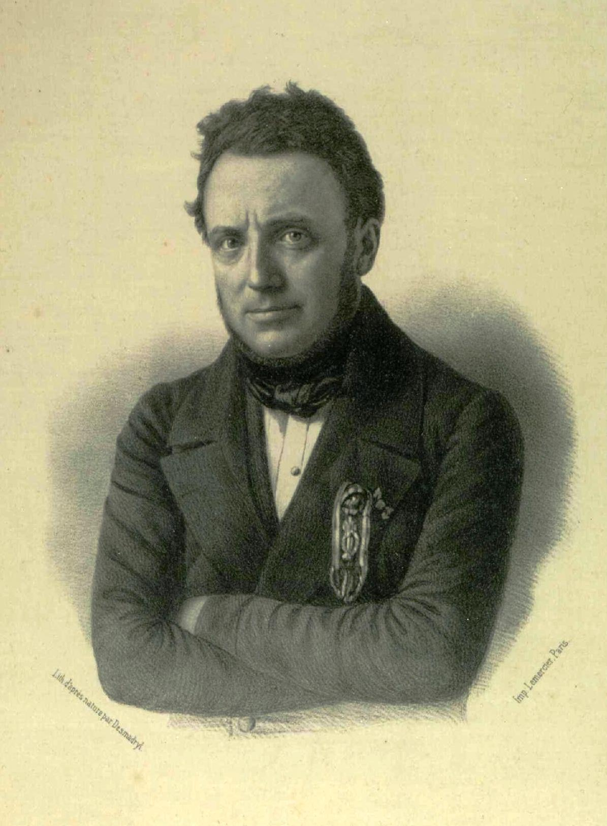 gravure